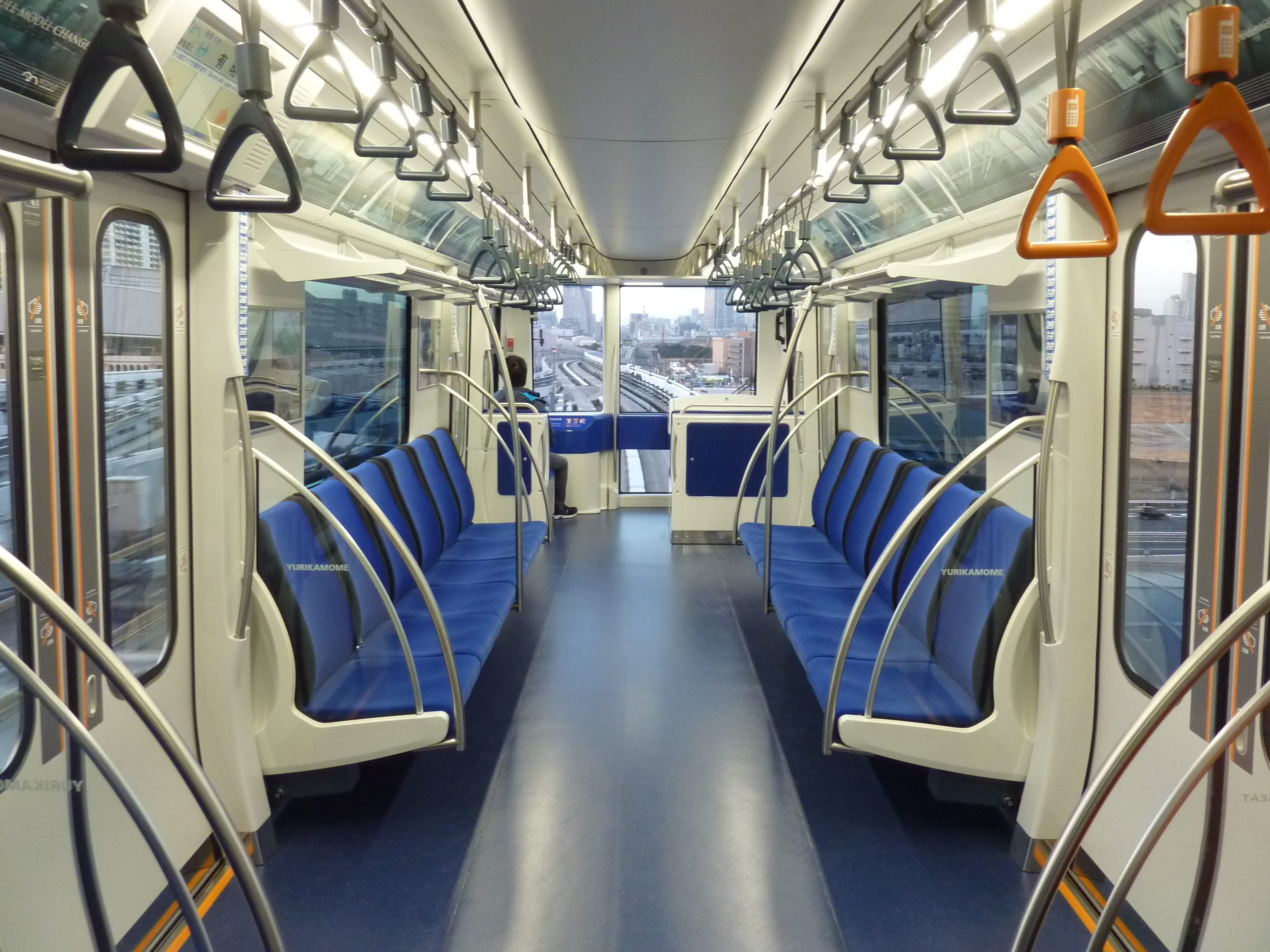 ゆりかもめ7300系の車内全景。